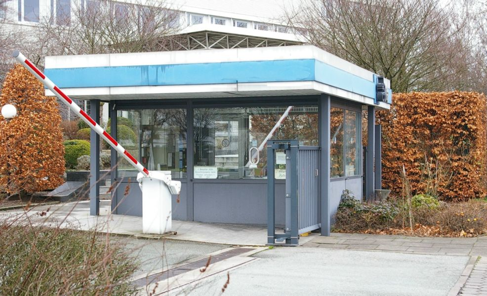 Pförtnerhäuschen